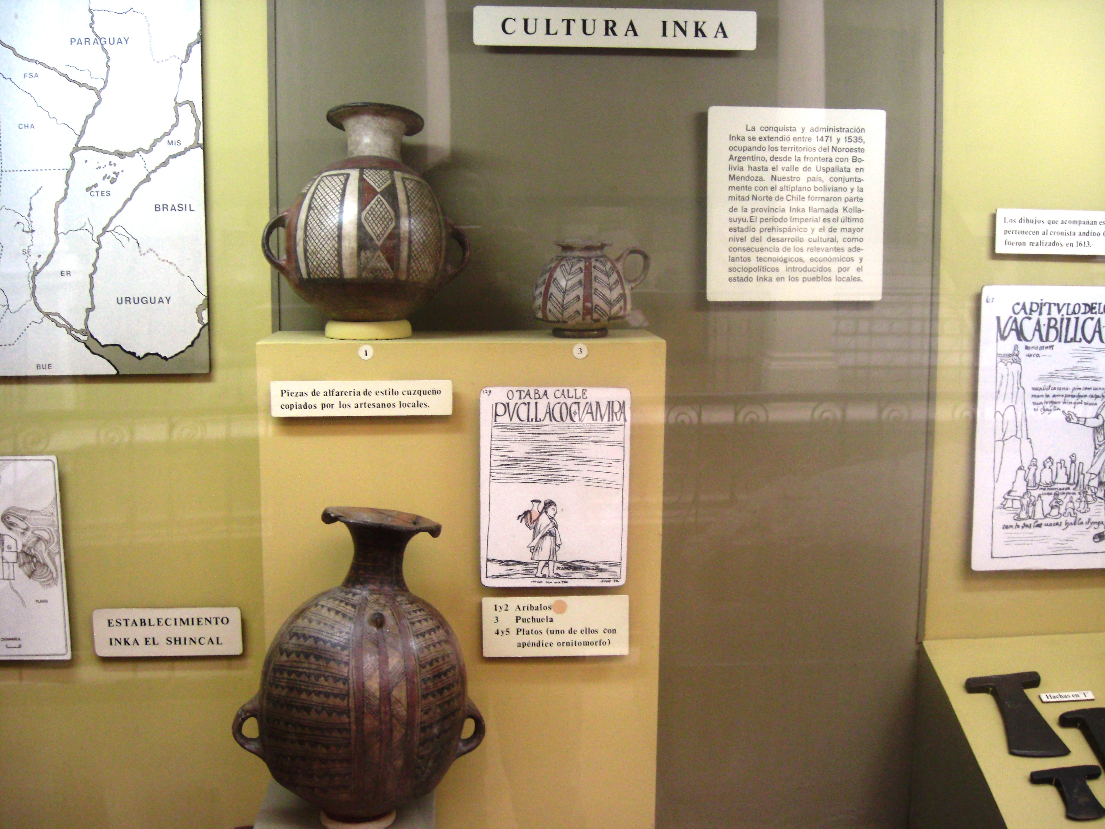 Detalle de la vitrina dedicada a la cultura Inka Shincal piezas de alfarería estilo cusqueño copiadas por los artesanos locales. Museo de la Plata. Argentina